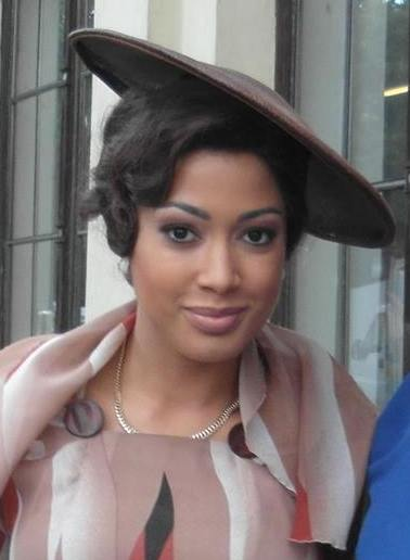 Patricia Kazadi jako Reri na planie serialu Bodo, 2015.